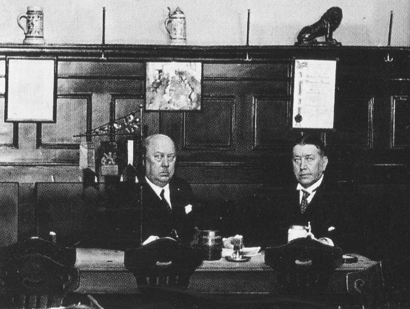 Interiör från Restaurang Löwenbräu, t.v. sitter restaurangens grundare Paul E. Paulson